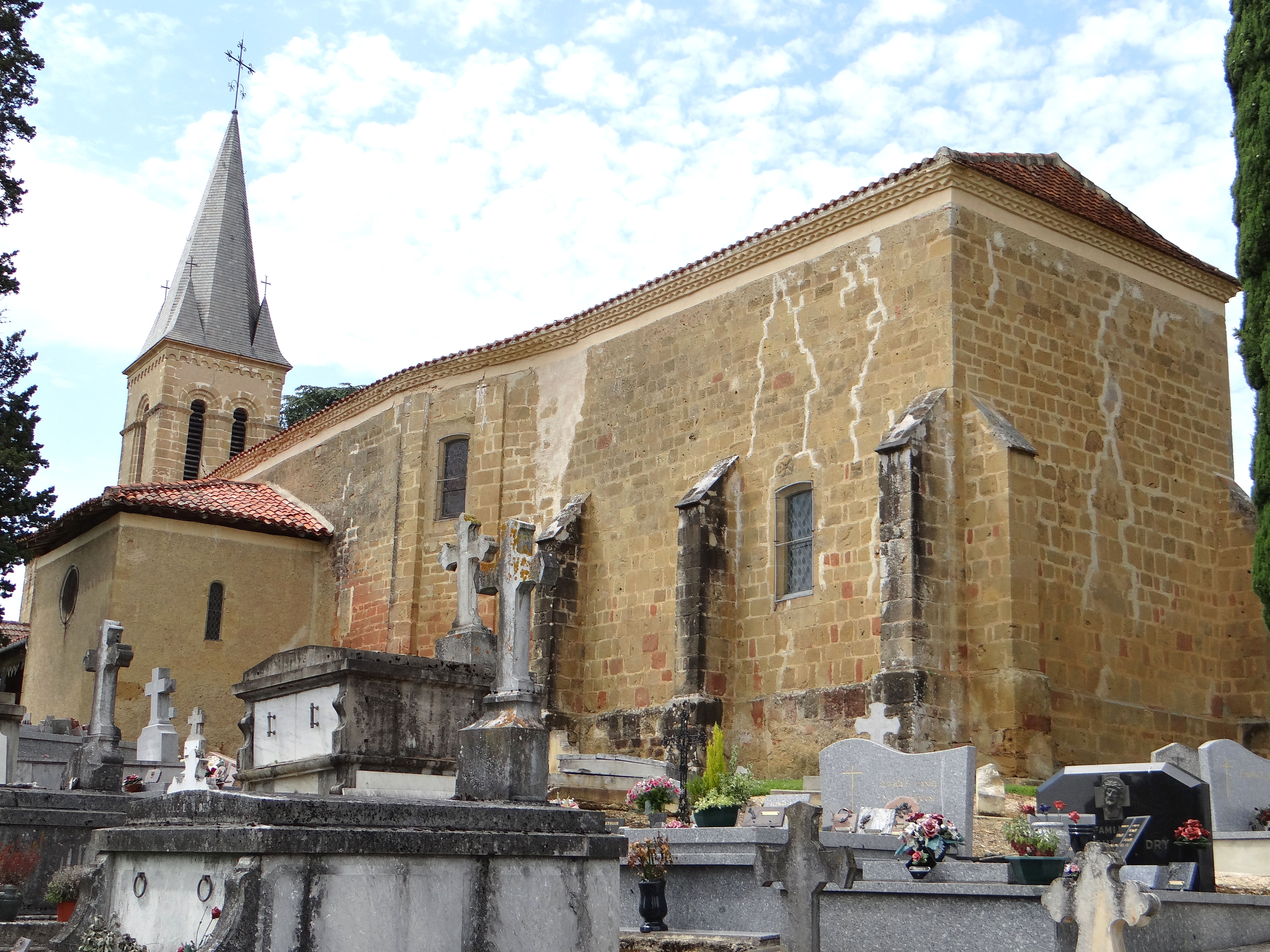 Sainte-Dode - Église Sainte-Dode - Chevet